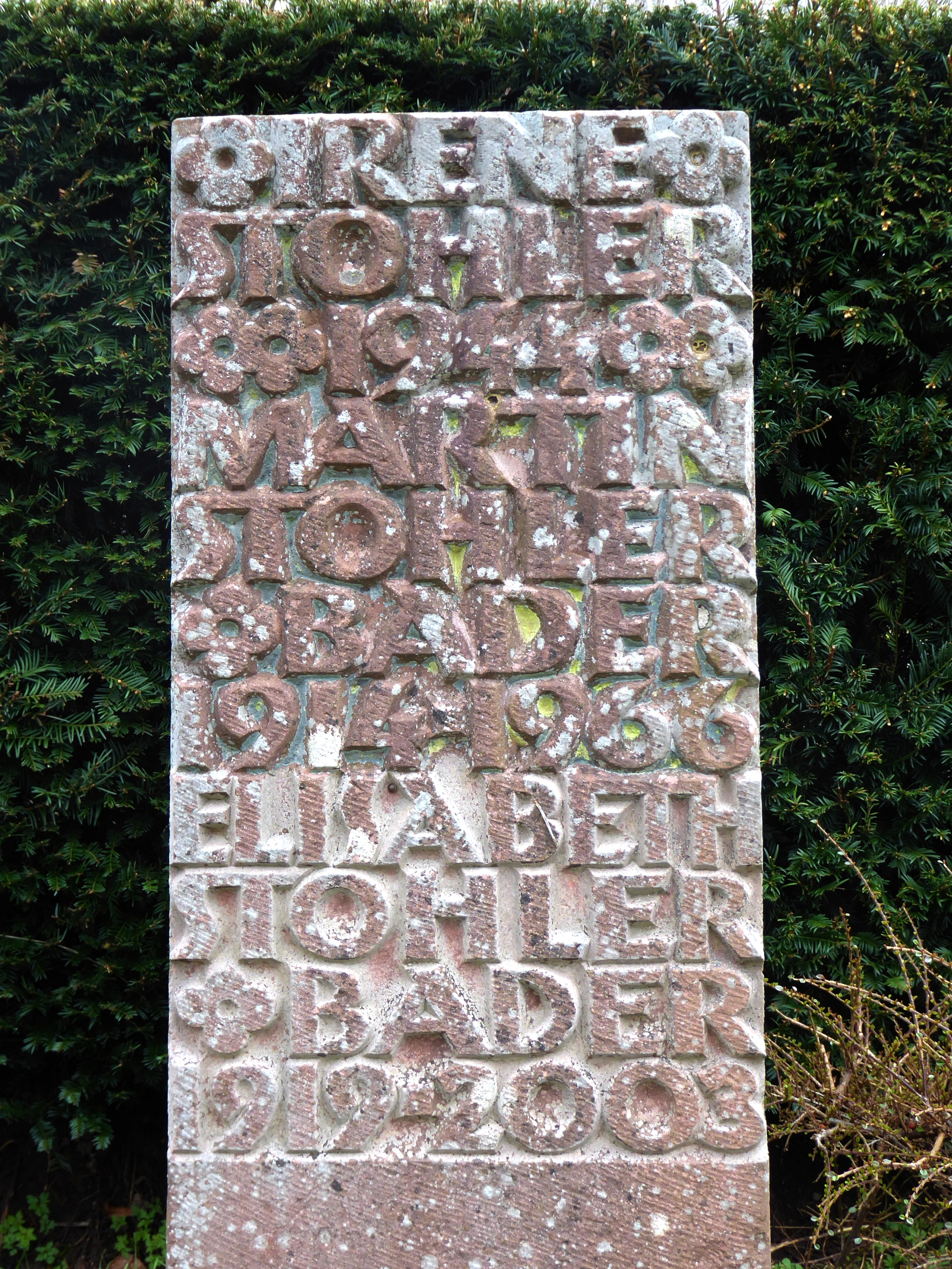 Martin Stohler (1914-1966) Jurist, Politiker, Gewerkschafter. Familiengrab auf dem Friedhof am Hörnli.